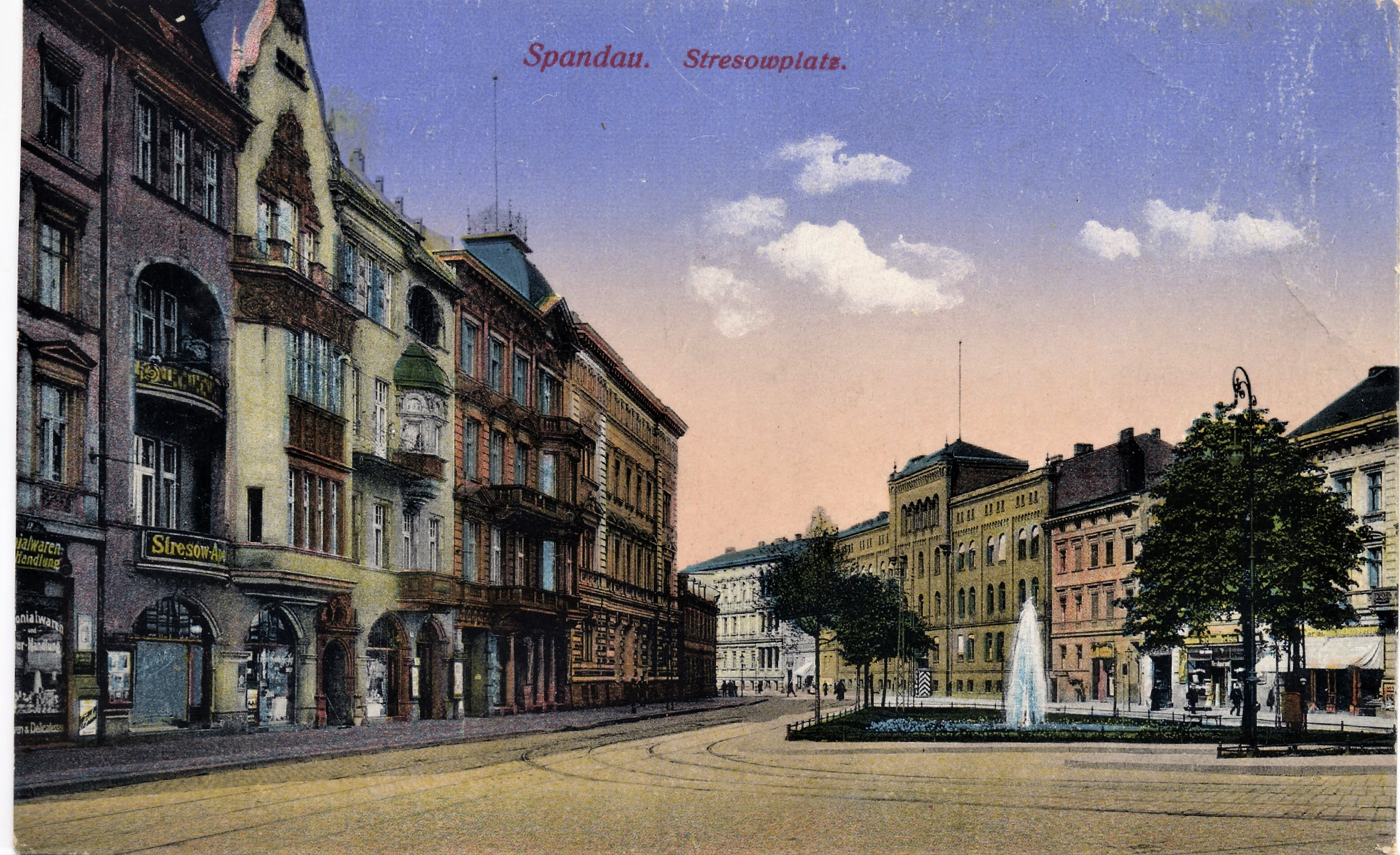 Ansicht vom Stresowplatz in Spandau aus dem Jahre 1915 (Poststempel Spandau 15. Februar 1915)